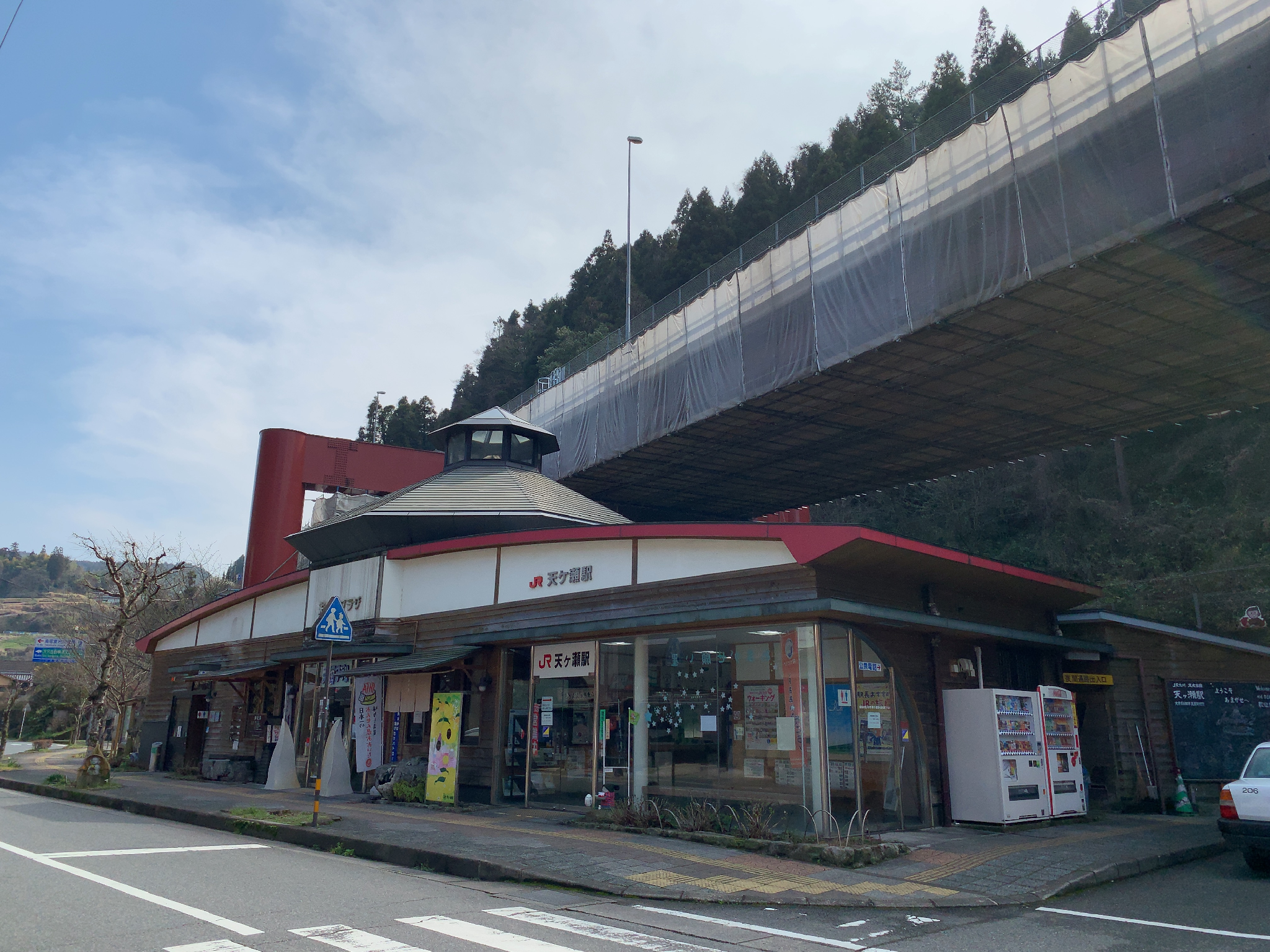 JR天ヶ瀬駅 駅舎